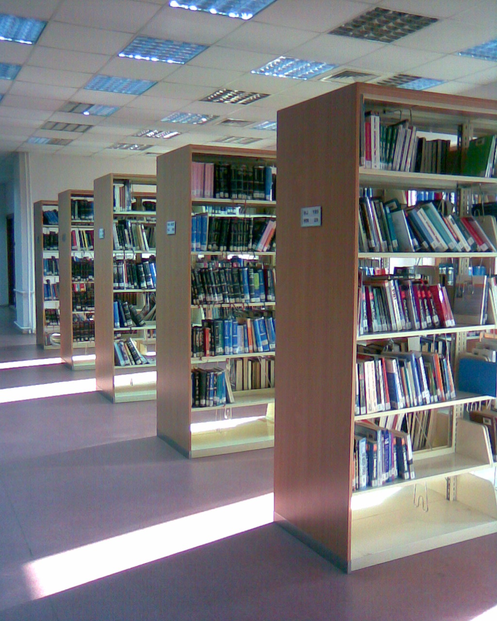 Kütüphane